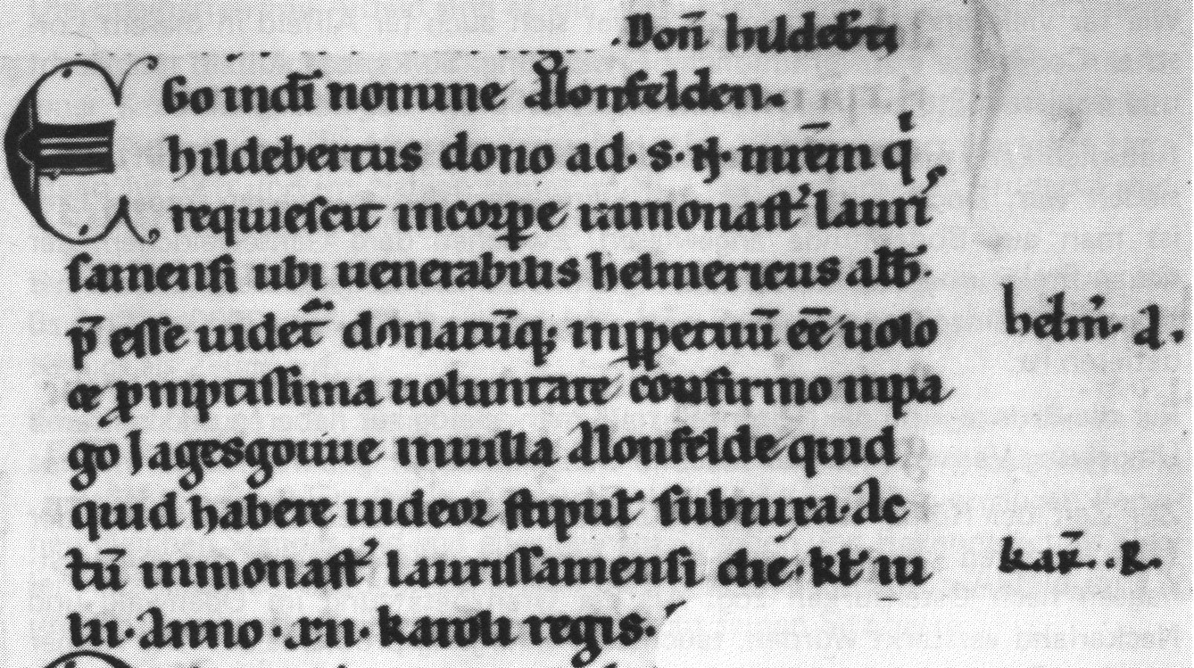 Ausschnitt aus Lorscher Codex: Erste urkundliche Erwähnung von Billigheim-Allfeld